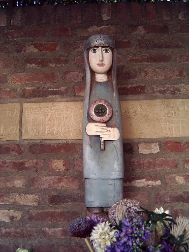 Limburgs: Maria kapel in Vild bie Valkeberg